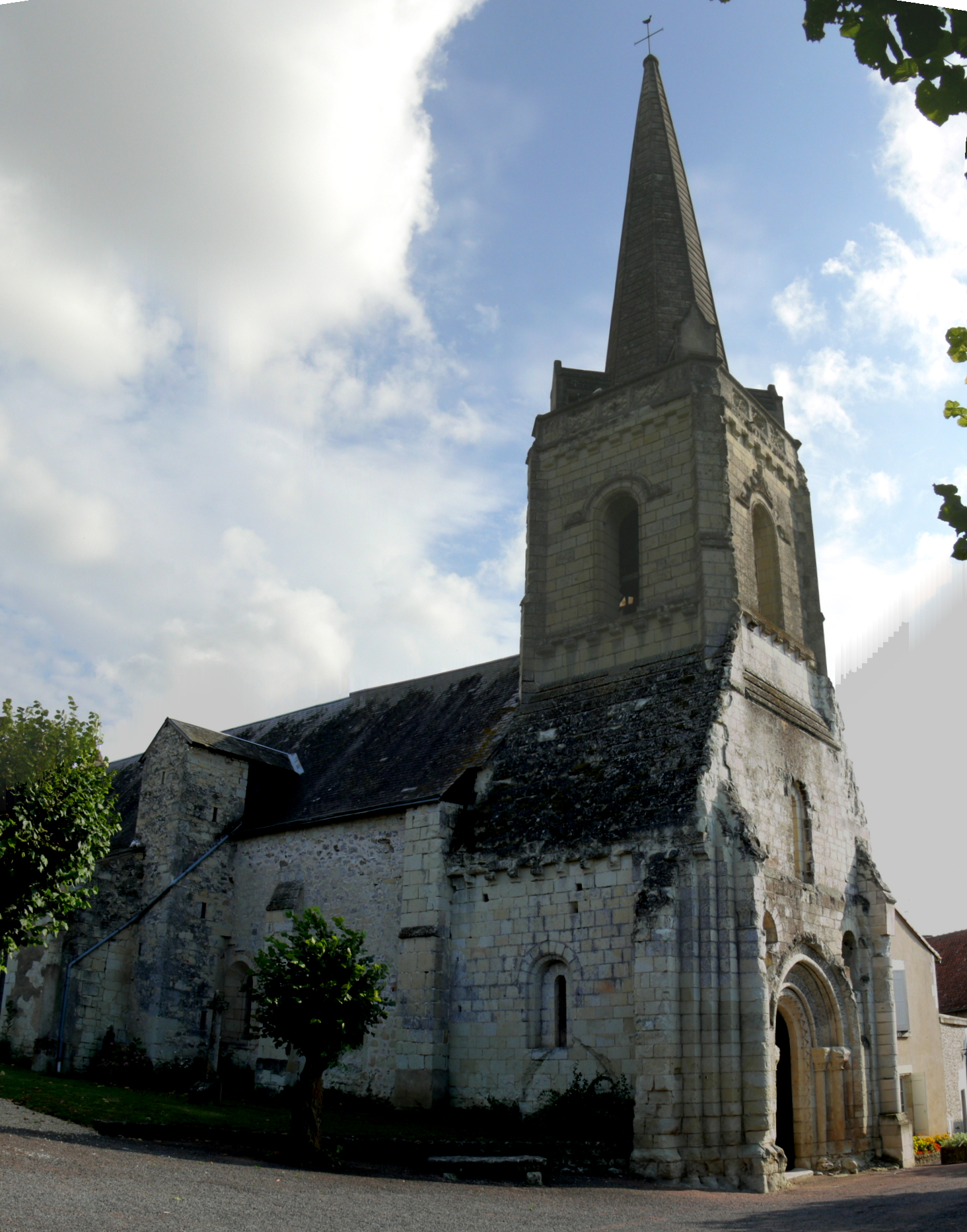 Église Saint-Rémi de Chenevelles